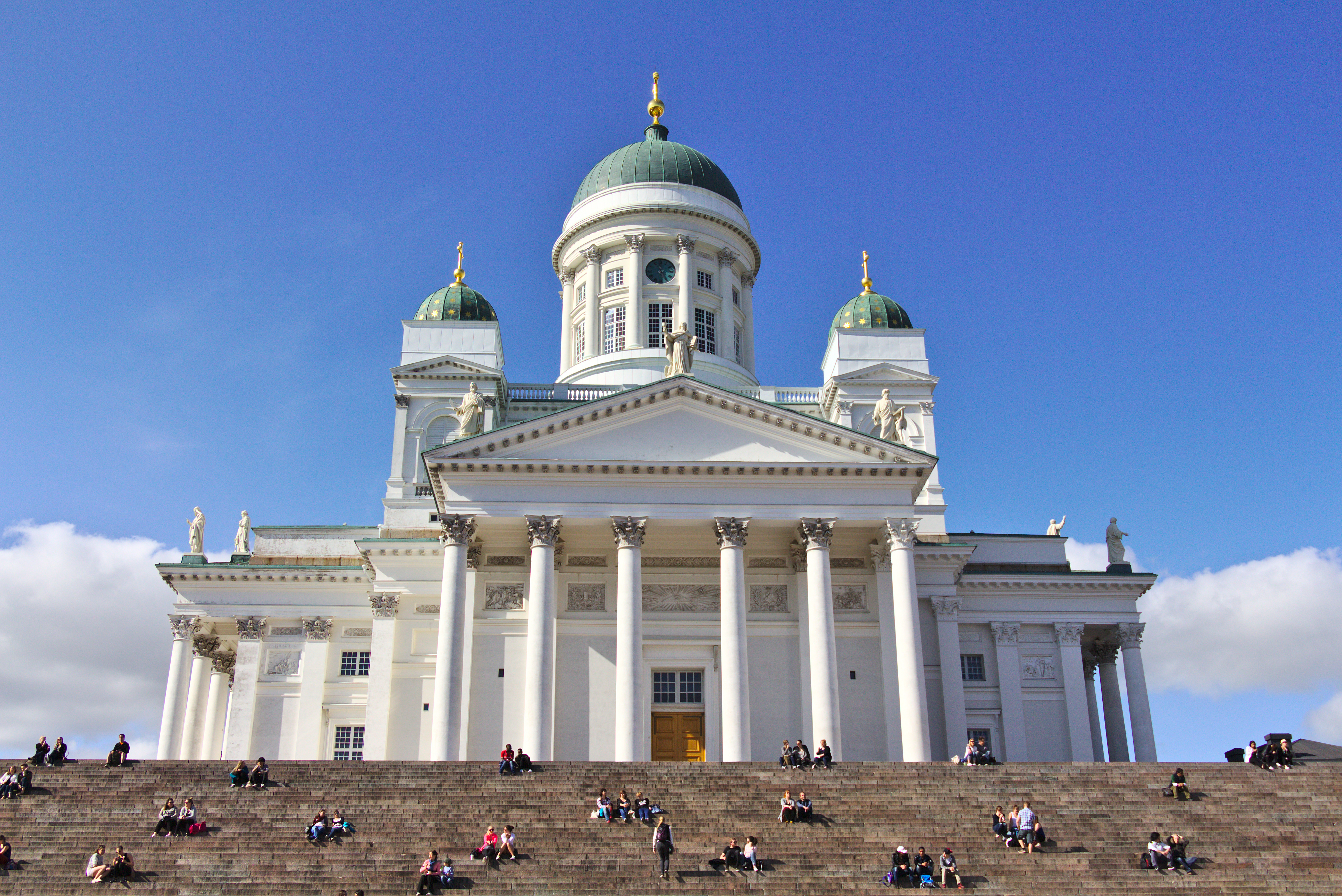 Кафедральный собор Лютеранской церкви на Сенатской площади